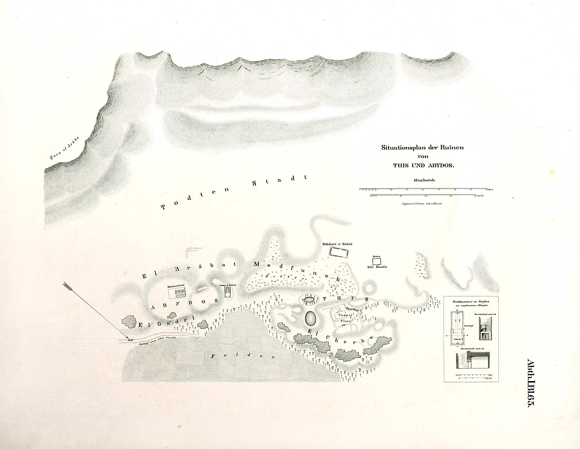 Denkmaeler aus Aegypten und Aethiopien nach den Zeichnungen der von Seiner Majestät dem Koenige von Preussen, Friedrich Wilhelm IV., nach diesen Ländern gesendeten, und in den Jahren 1842–1845 ausgeführten wissenschaftlichen Expedition auf Befehl Seiner Majestät